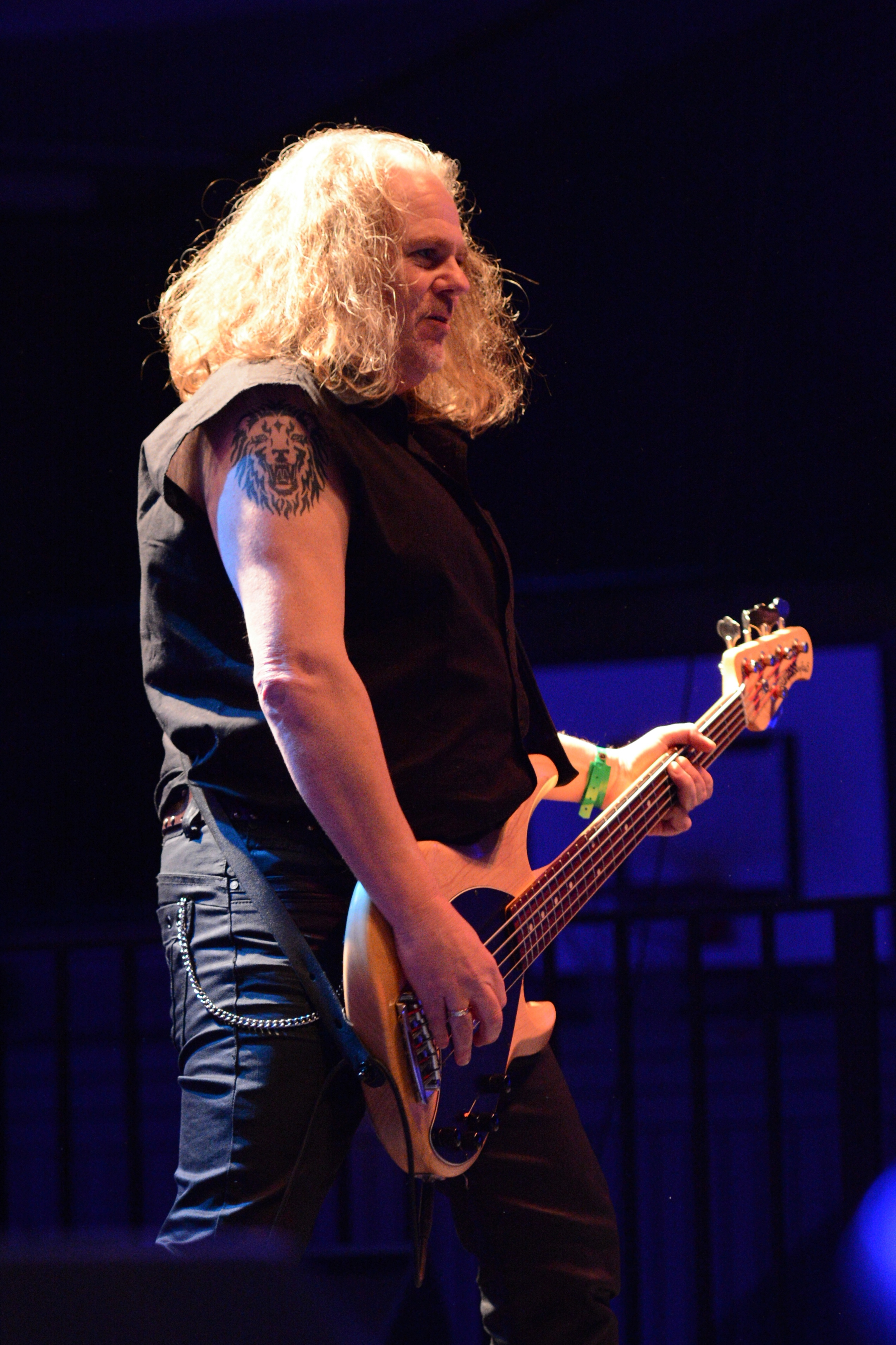 Bourbon Street beim Benefiz-Festival Wuppertal hilft 2014. Bassist Thomas " Bodo" Smuszynski, ehemals U.D.O., Axel Rudi Pell und Running Wild